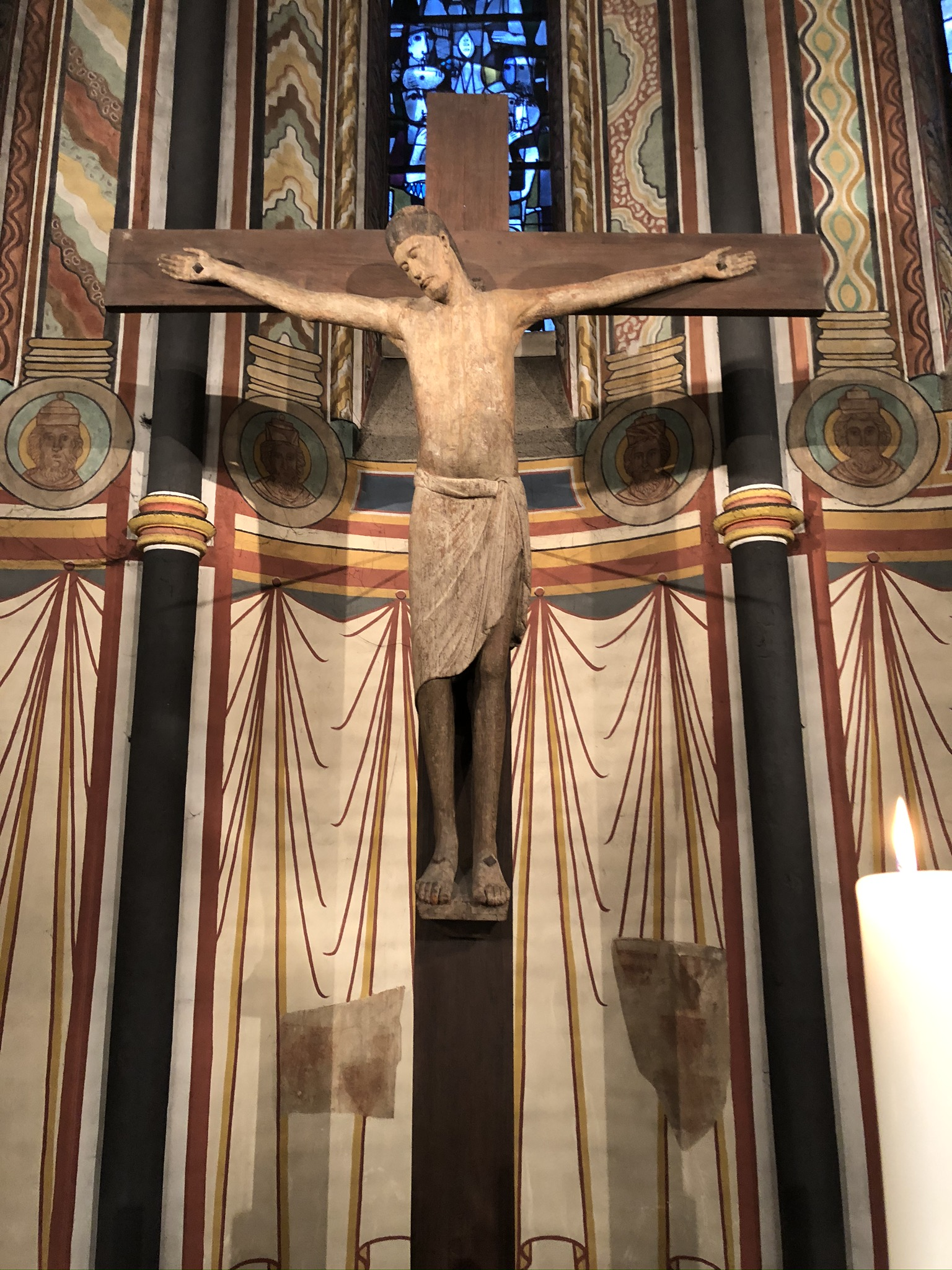 Kruzifix in St. Margareta, Düsseldorf Deutschland